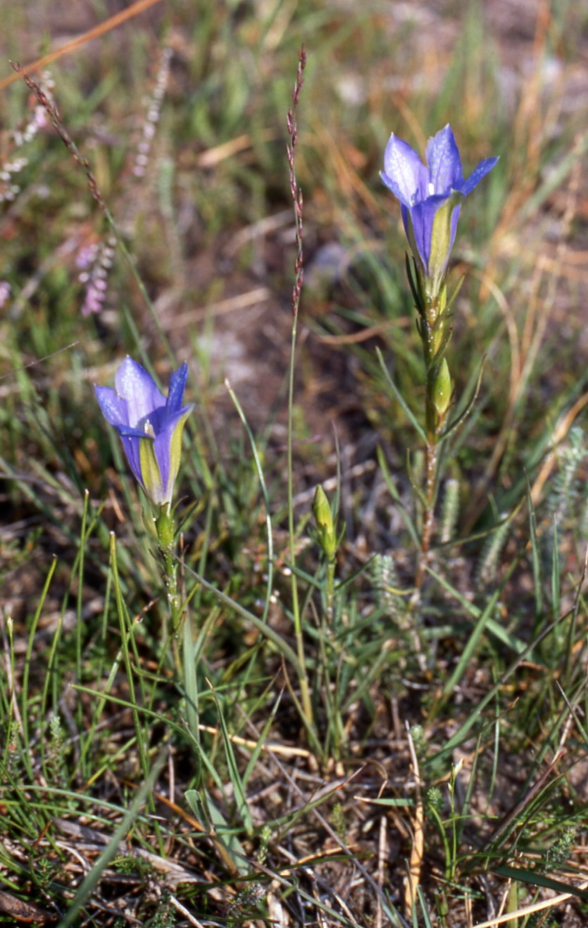 Lungen-Enzian (Gentiana pneumonanthe); blühend im Heidemoor "Gildehauser Venn".